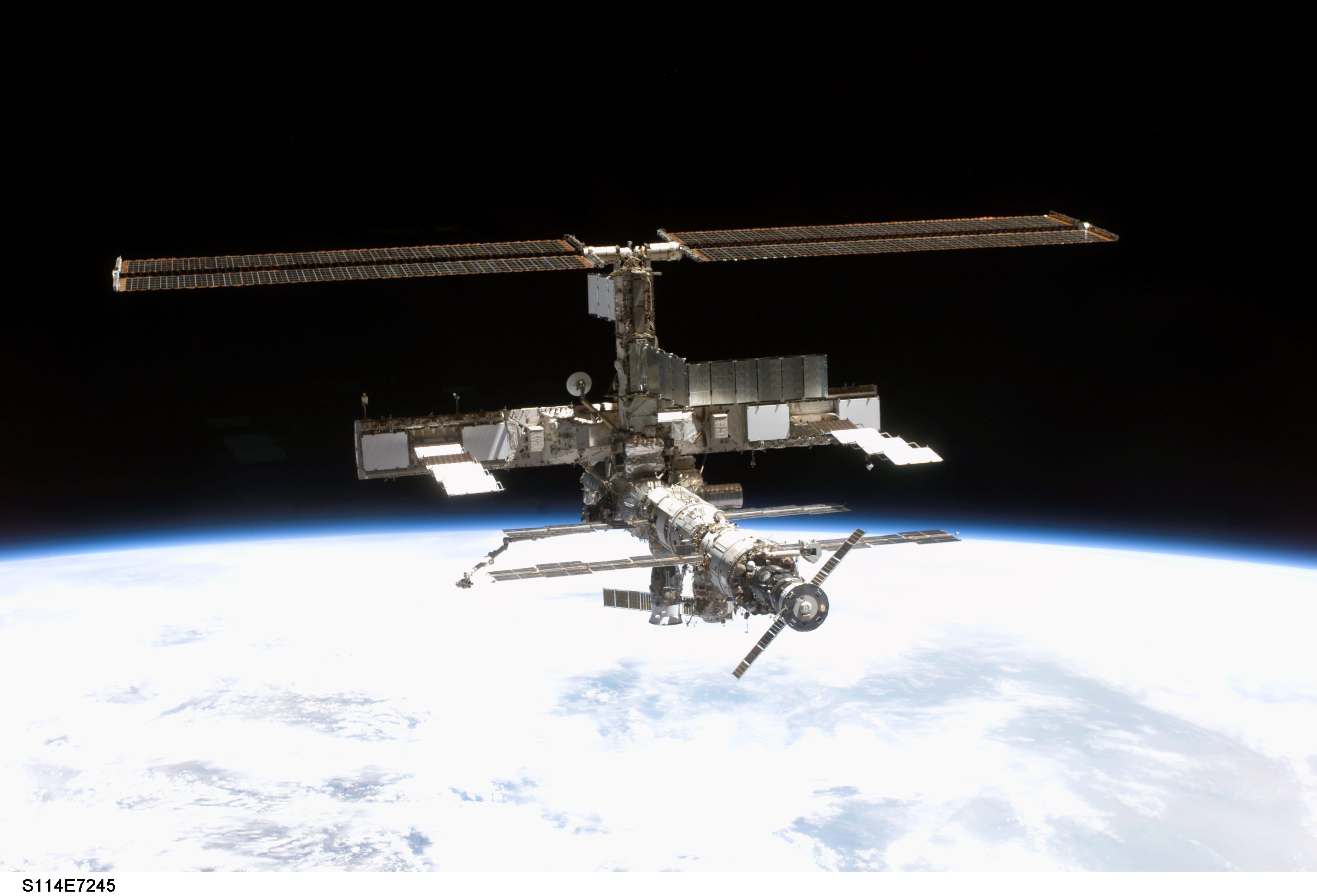 ISS as seen by STS-114